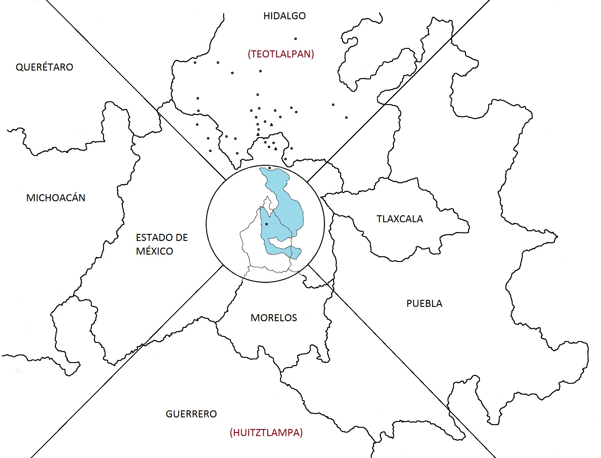 Mapa que muestra la proyección que hacían los nahuas de su concepción del mundo y los puntos cardinales. Muestra el concepto de un mundo cuadrado surgido por los puntos de los solsticios de verano e invierno, que forman una cruz; su área nuclear concebida como centro circular se representaba por un jade (chalchihuitl). Muestra la ubicación de las poblaciones más importantes en el norte, llamado Mictlampa o Teotlalpan. Con triángulos se representan las cabeceras tributarias de la Triple Alianza, con círculos las demás poblaciones.